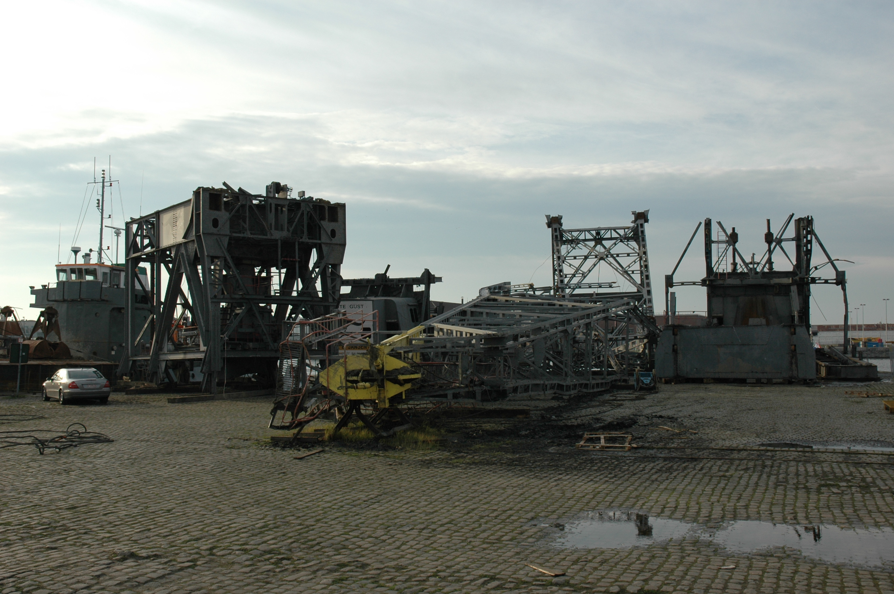 Schroot van de Grote Gust elliezabet eigen opname 29 december 2006